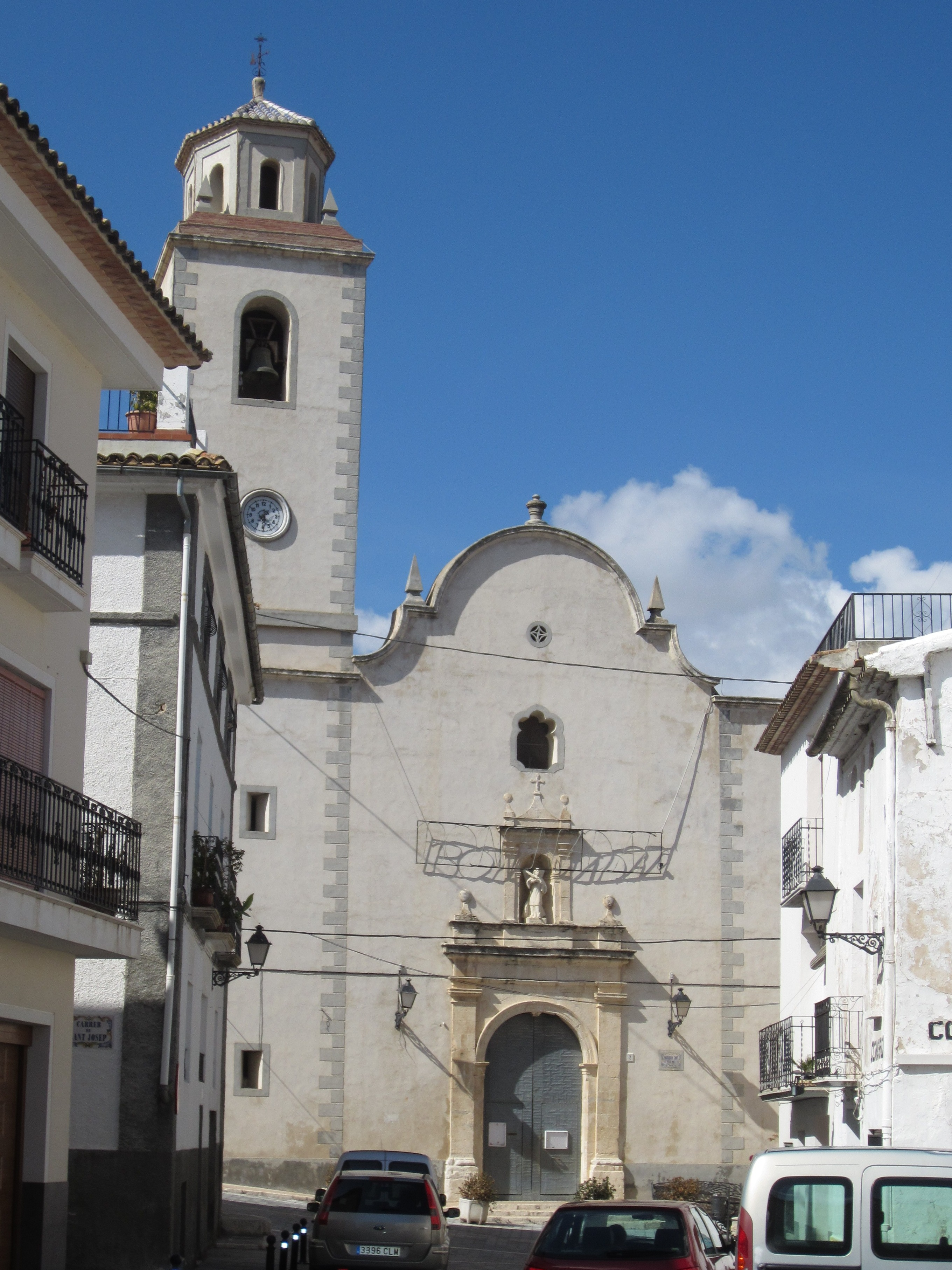 Iglesia parroquial dedicada a San Vicente Mártir en Benimantell (Provincia de Alicante)